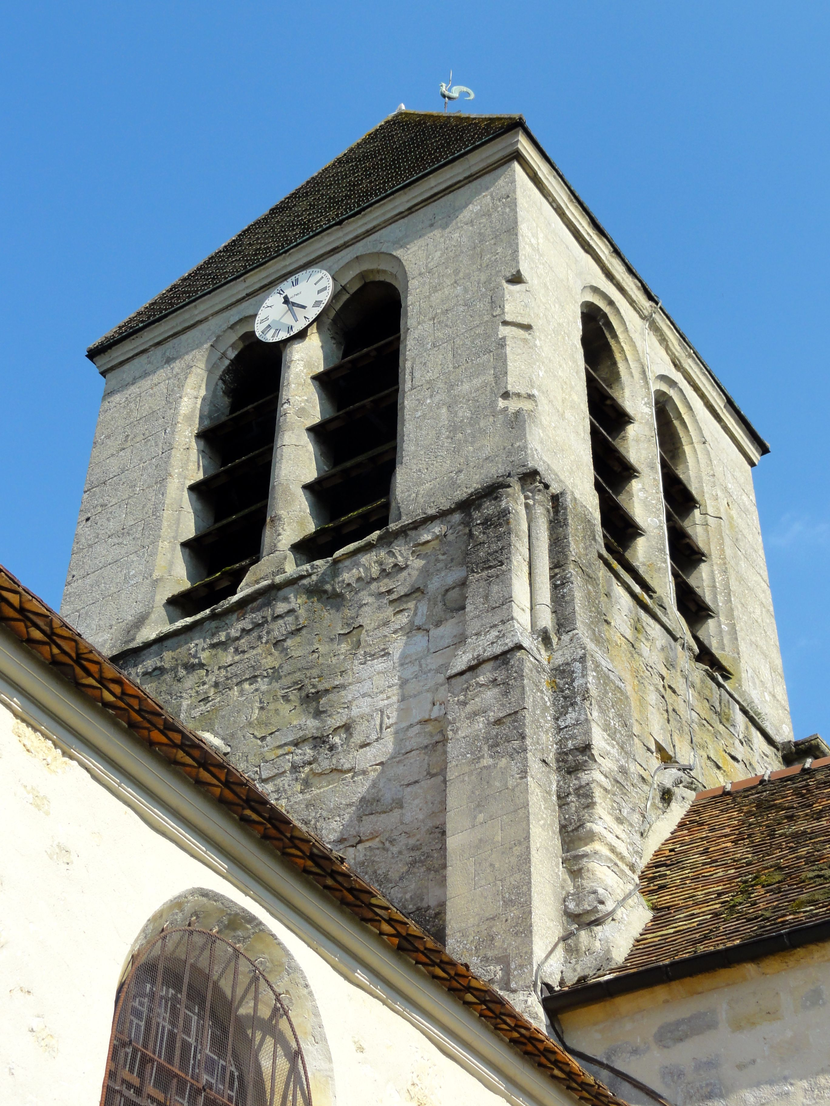 Clocher.